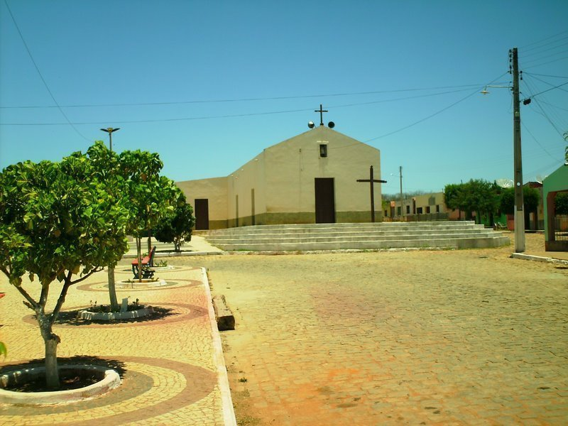 catedral flamengo